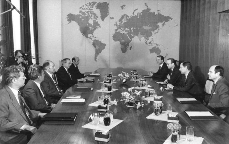 ADN-ZB Mittelstädt-26.3.1987-zin Berlin: Schäuble-Besuch Der Minister für Auswärtige Angelegenheiten der DDR, Oskar Fischer (3.v.l.), empfing den Bundesminister für besondere Aufgaben und Chef des Bundeskanzleramtes der BRD, Dr. Wolfgang Schäuble (2.v.r.), zu einem Gespräch. 3.v.r. der Leiter der Ständigen Vertretung der BRD in der DDR Dr. Hans-Otto Bräutigam.